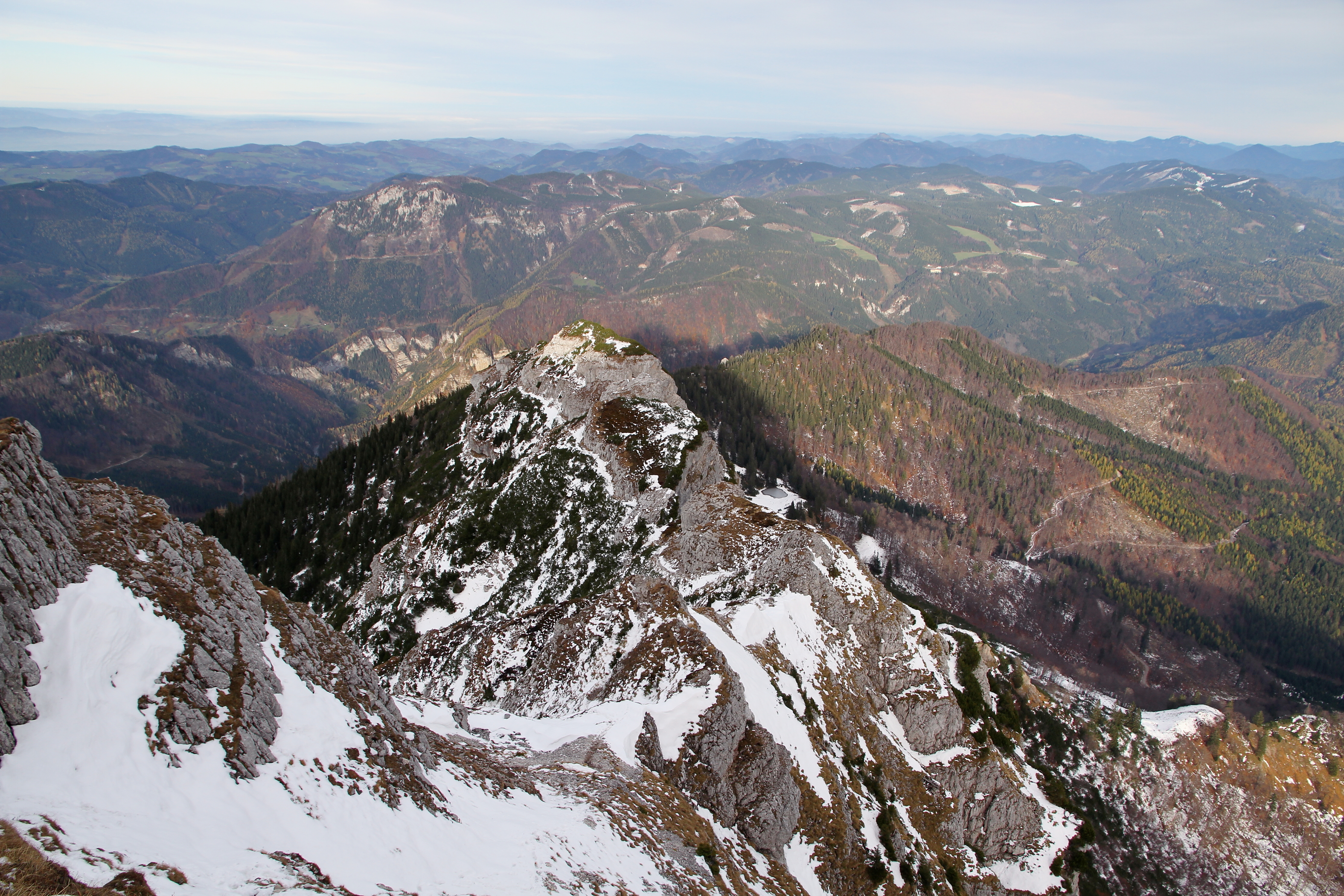 Der Ostgrat des Ötschers, auch als Rauer Kamm bezeichnet. Blick vom Mittelteil Richtung Nordost bzw. abwärts.